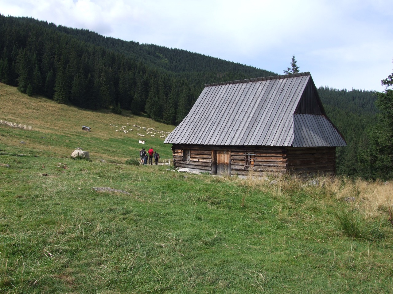 Bacówka na Rusinowej Polanie